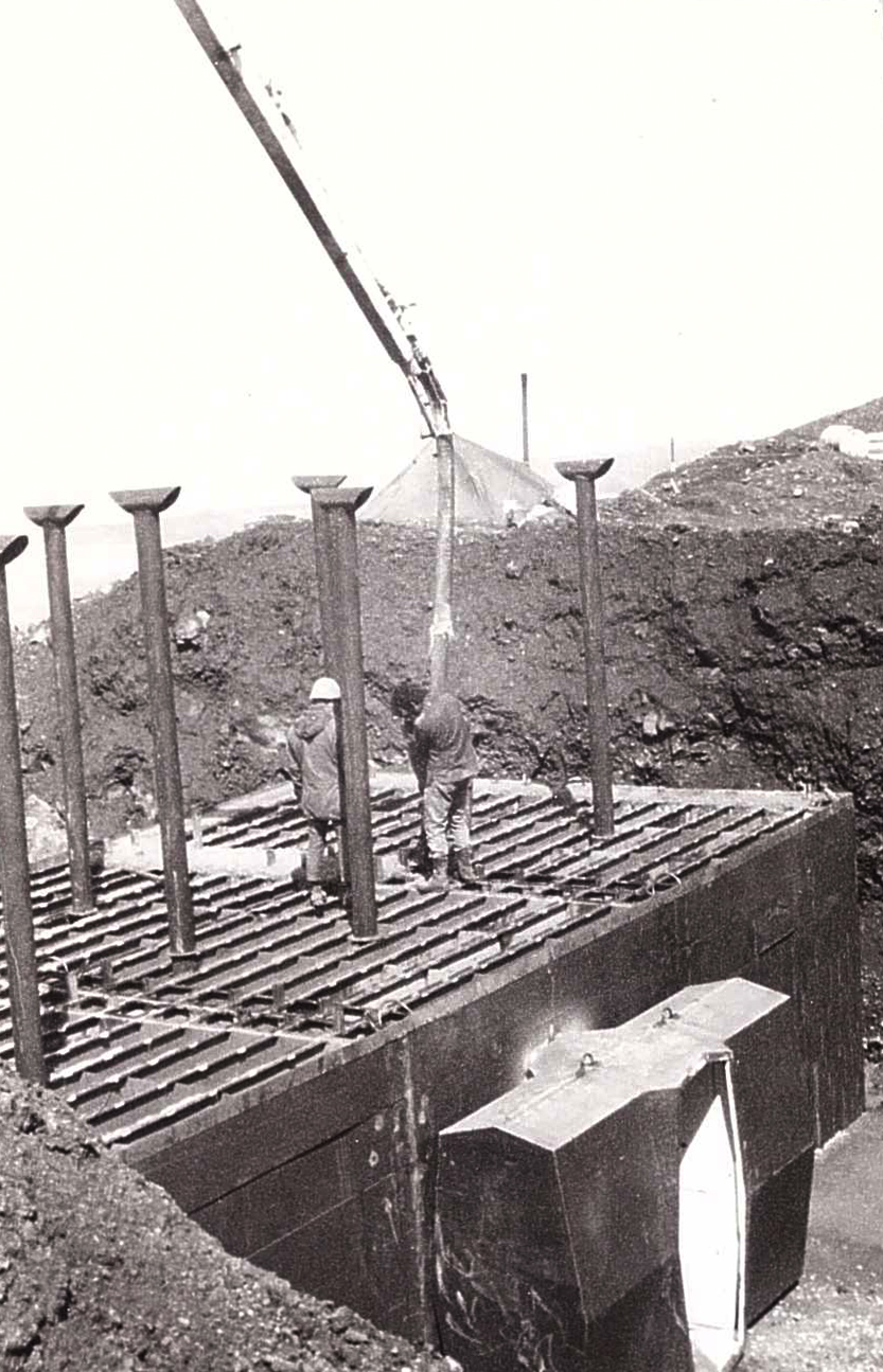 קוביות לסקוב